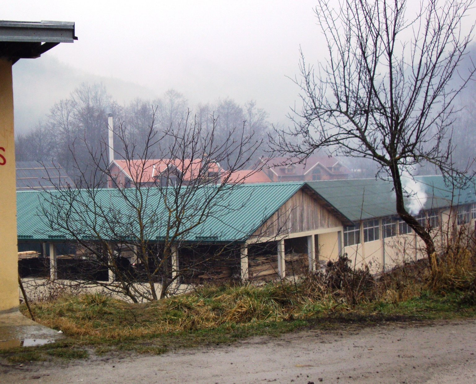 Vlahinja selo, Kuršumlija